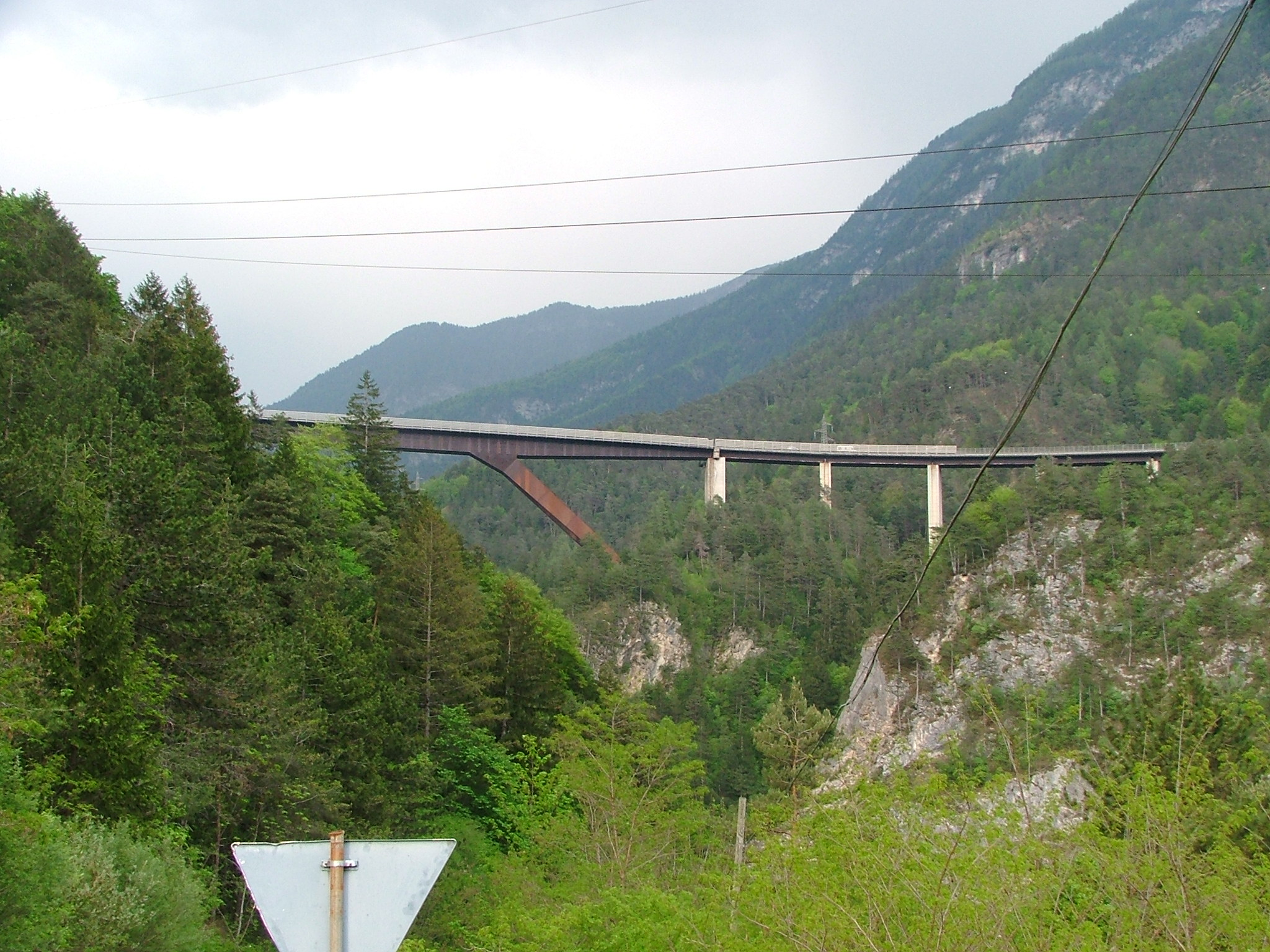 Ponte Cadore, Pieve di Cadore (BL), Dolomiti, Italy